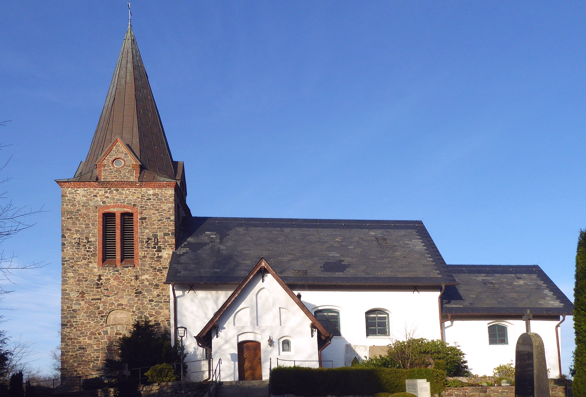 Großsolt Feldsteinkirche mit Turm und Ostportalversatz aus Natursteinquadern - Foto 2018 Wolfgang Pehlemann P1280541